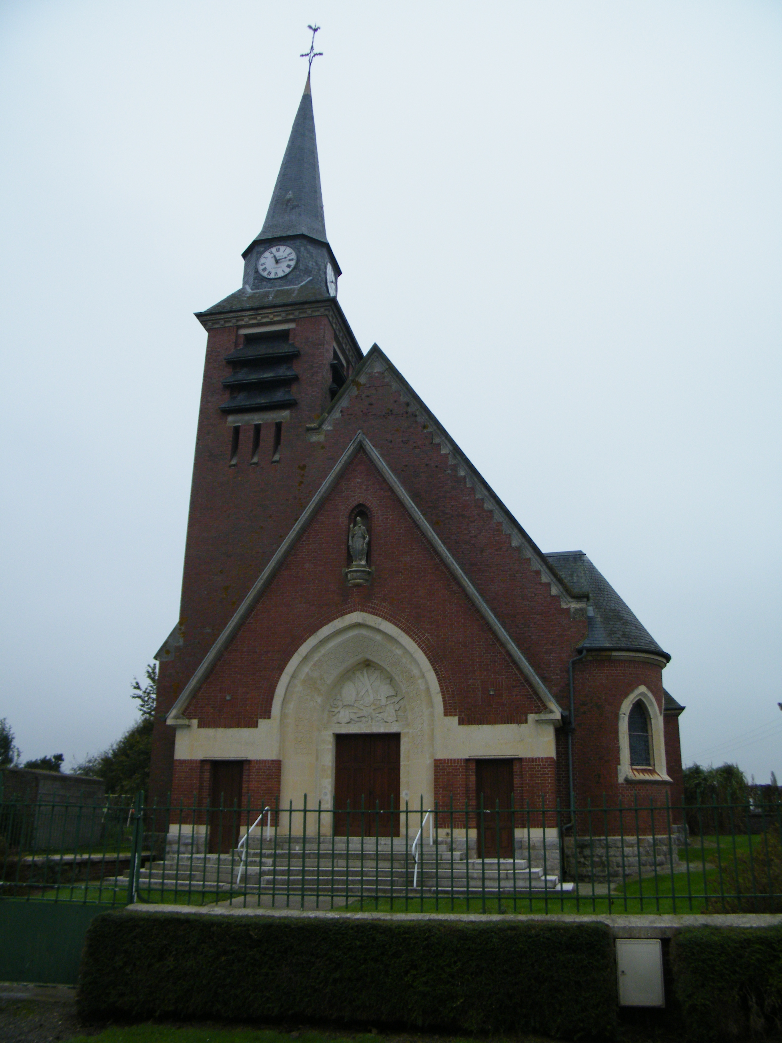 église.